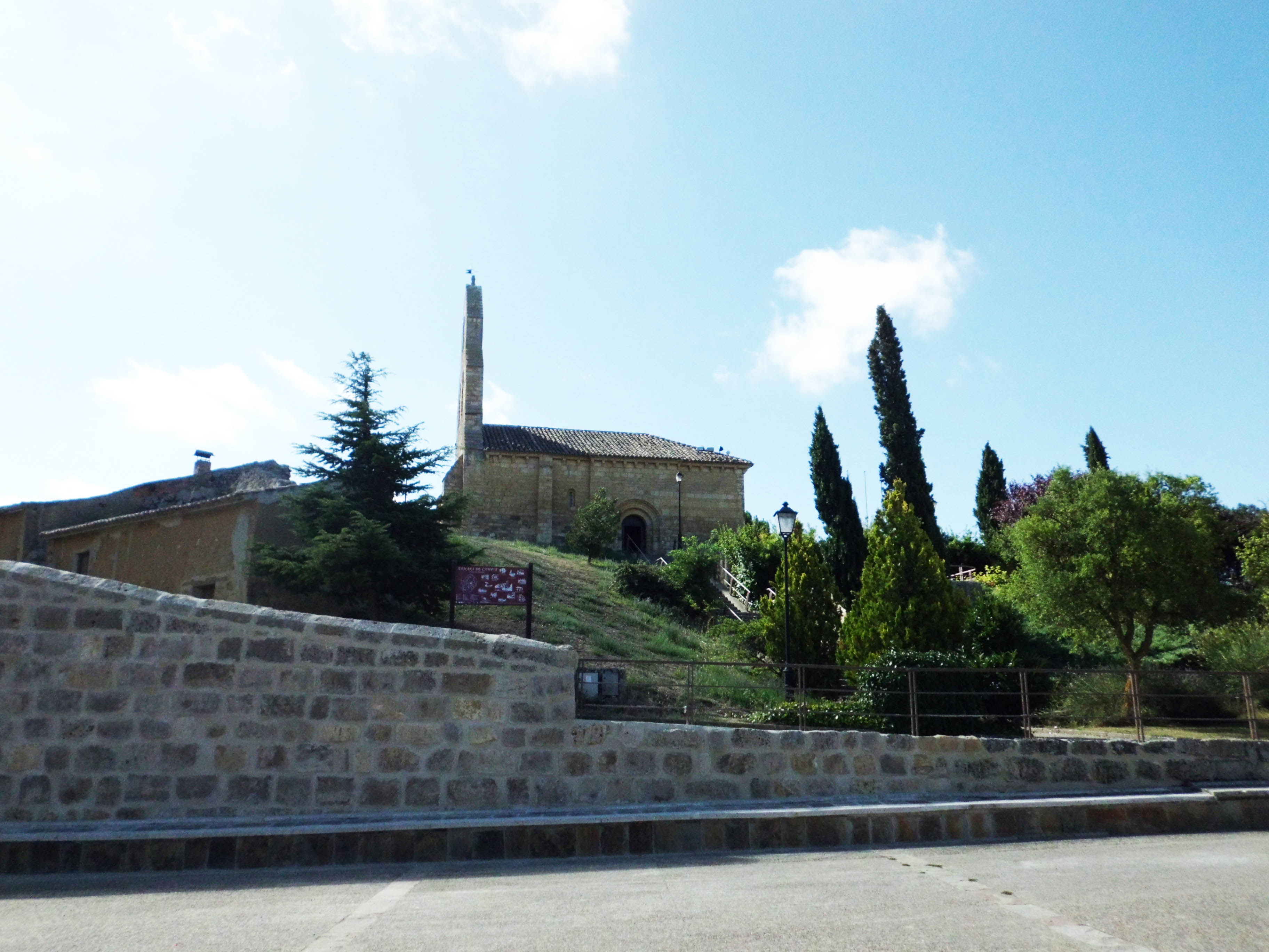 Támara de Campos (Palencia, España). Vista del edificio románico que fue la iglesia de la Orden de San Juan de Jerusalén.